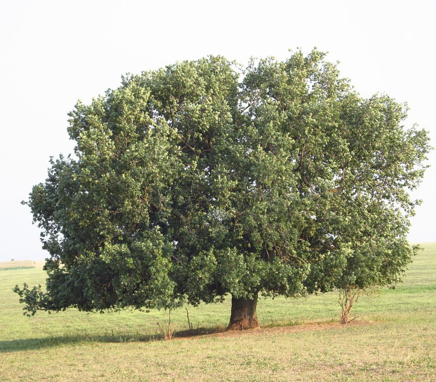 Cb-116